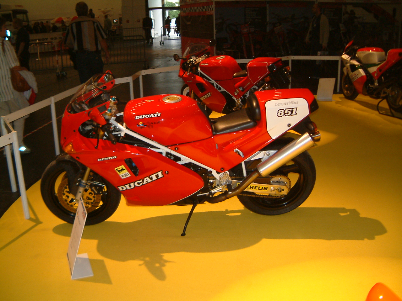 Ducati 851 früheres Modell Entstanden auf der Intermot 2004. Fotograf: (Steffen Wolf)